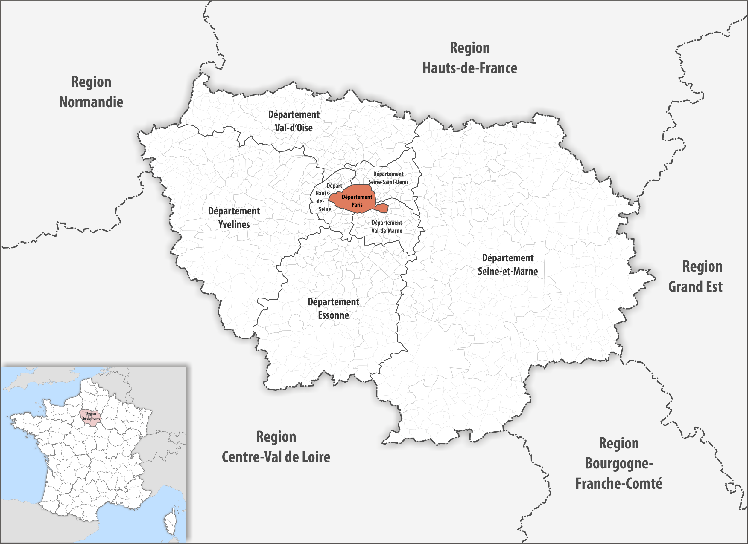 Lage des Departements Paris